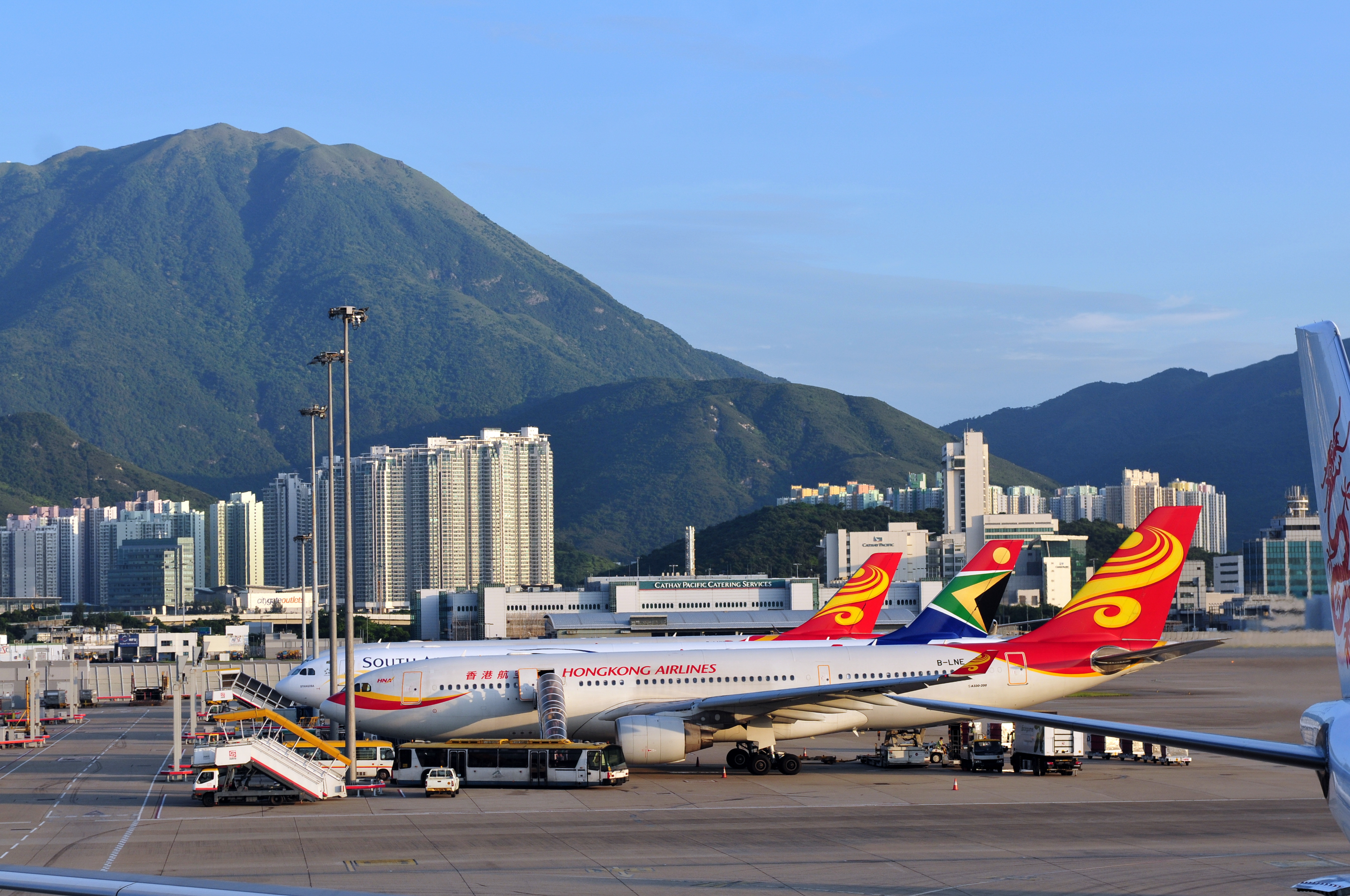 Wikimania 2013 Hongkong